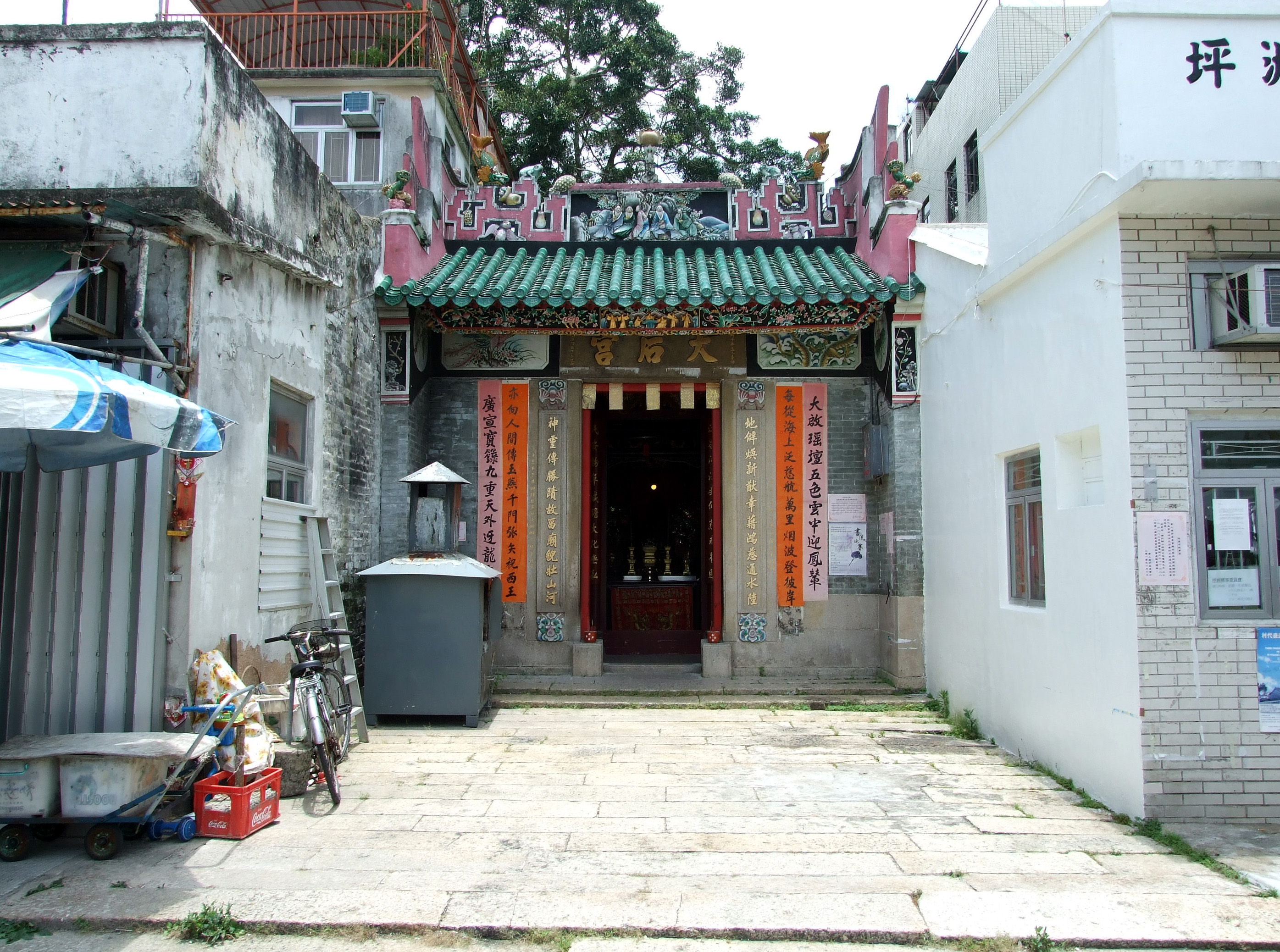 中文（香港）: 坪洲天后廟